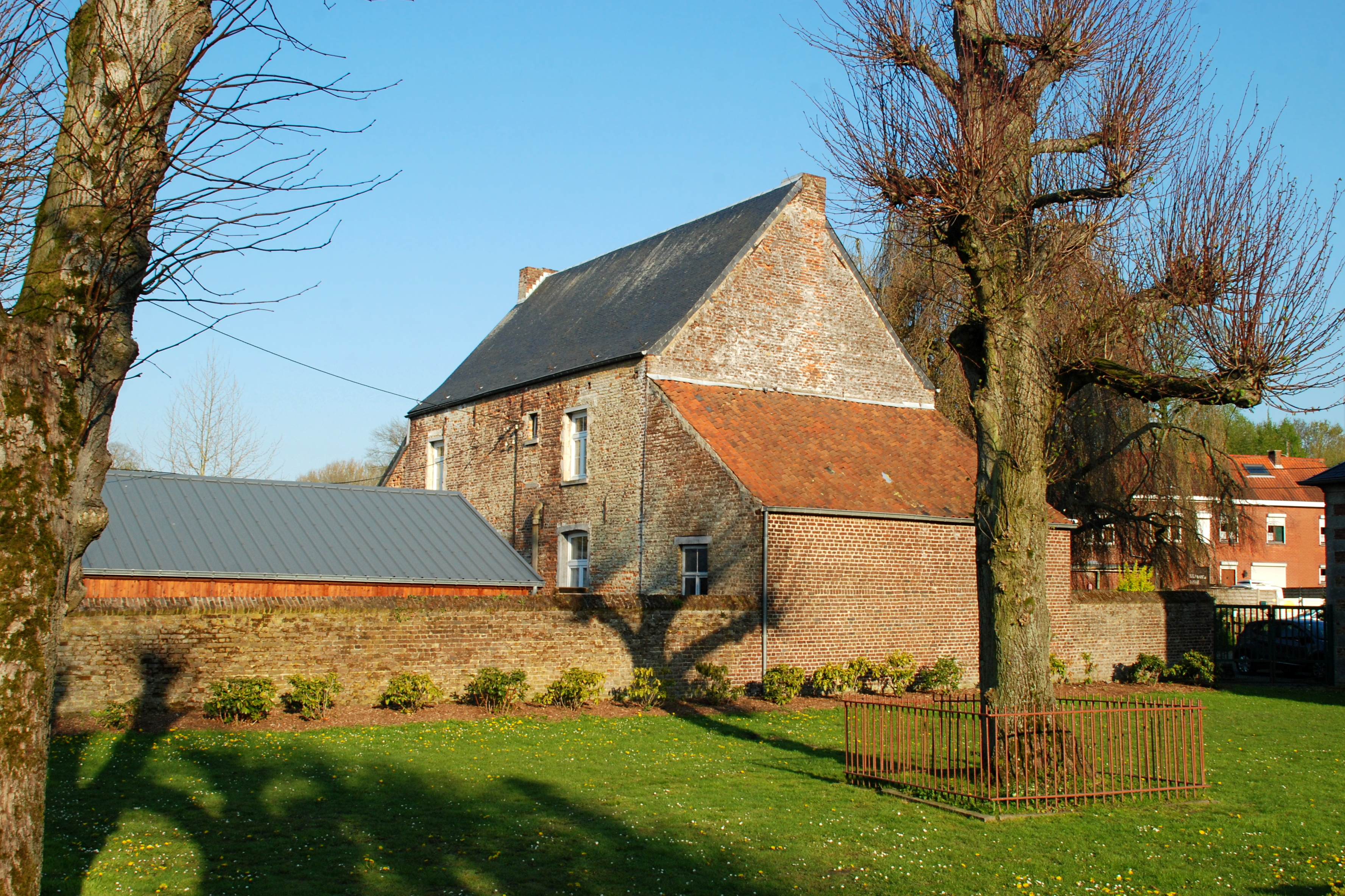 Belgique - Brabant wallon - Ways - Presbytère situé à côté de l'église Saint-Martin